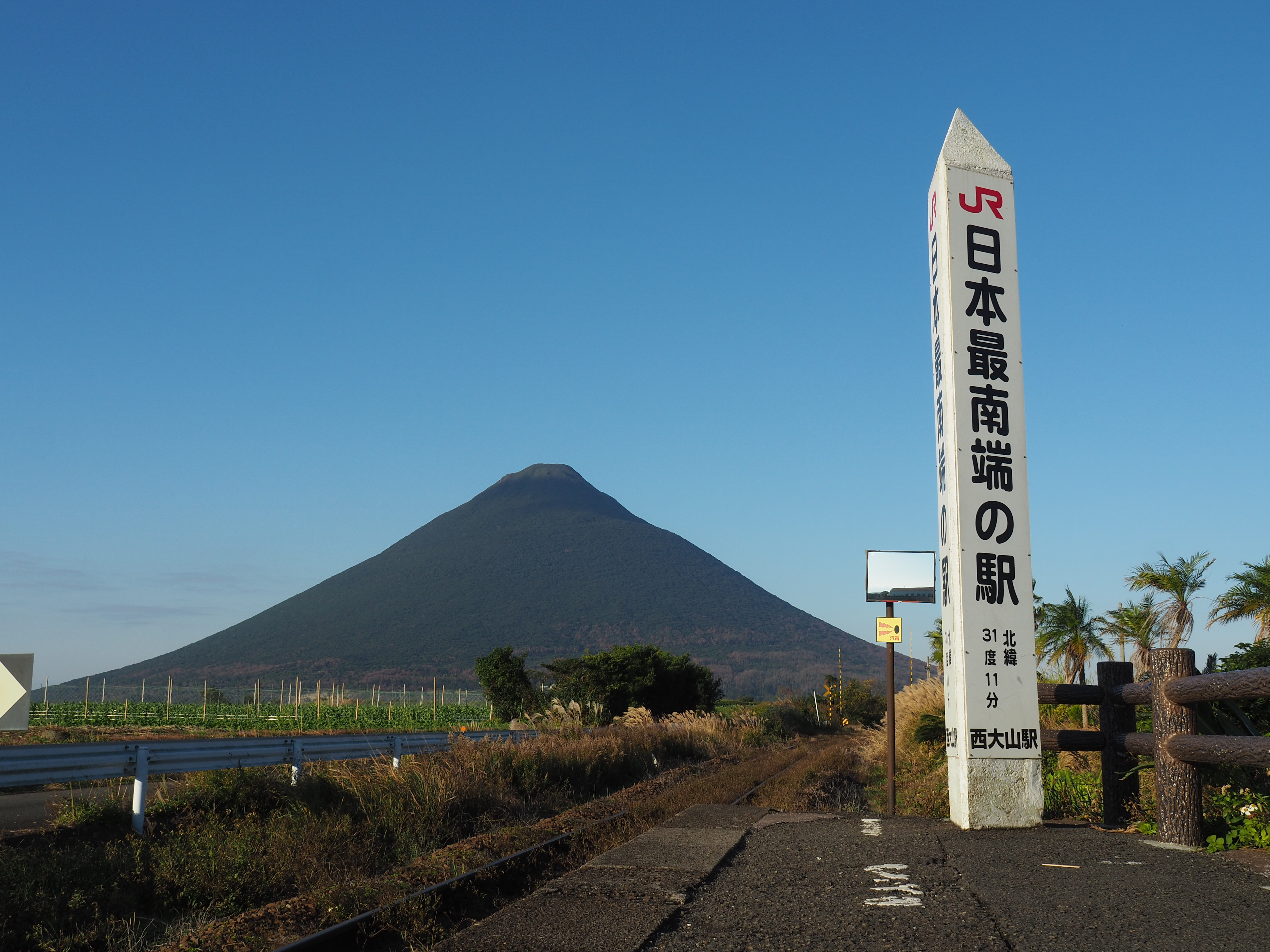 開聞岳とJR最南端駅の碑